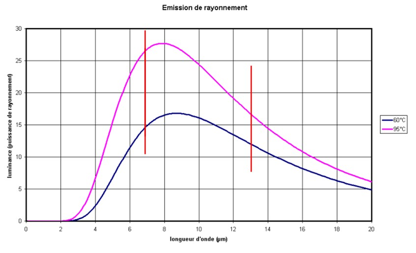 Graphe indiquant la luminance en fonction de la température de surface et de la frequence du rayonnement